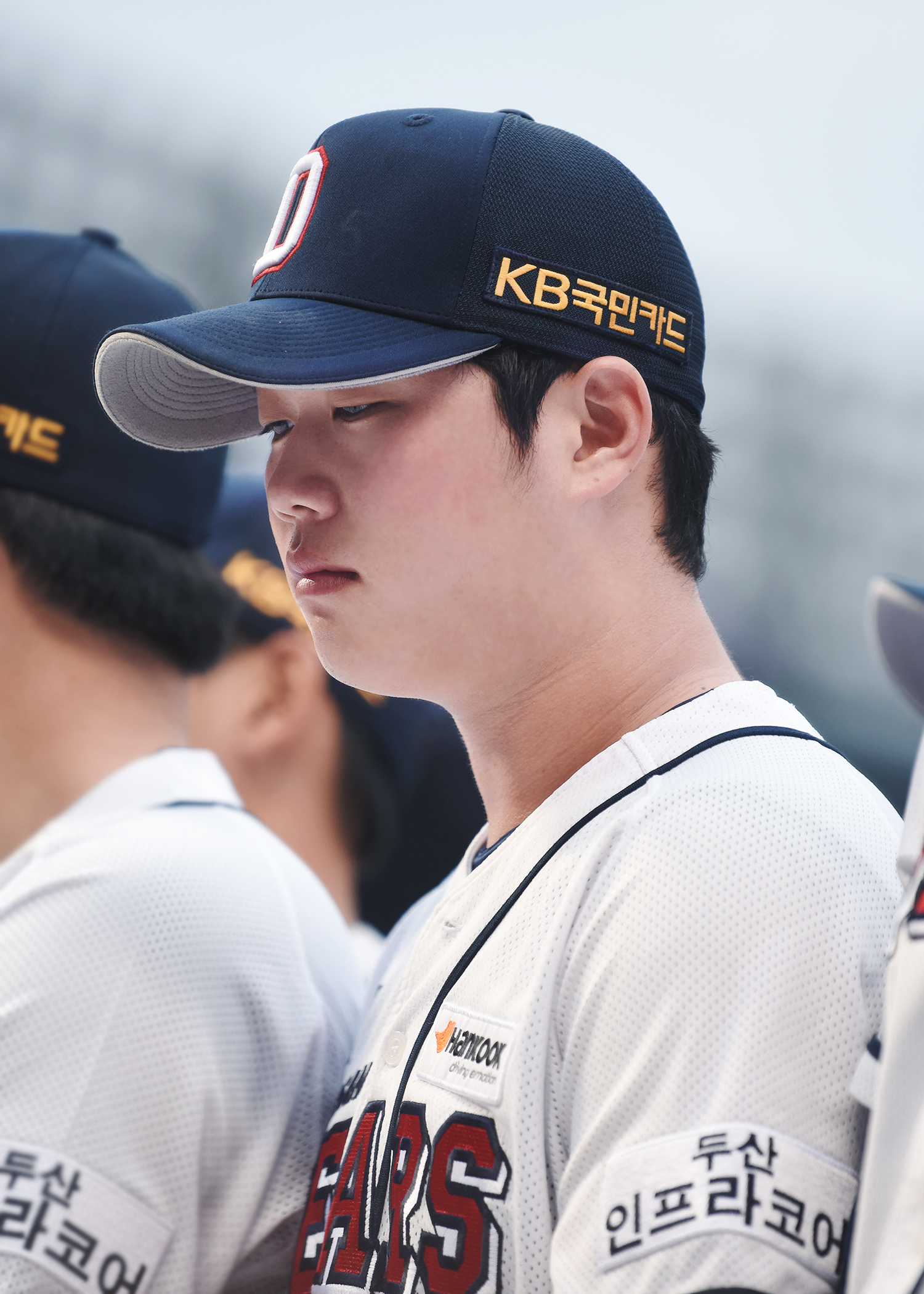 2017 10 03 두산베어스 팬 감사 단상인사 함덕주